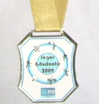 ficheiro que representa a medalha de ouro dos jogos estudantis 2009 no rio de janeiro